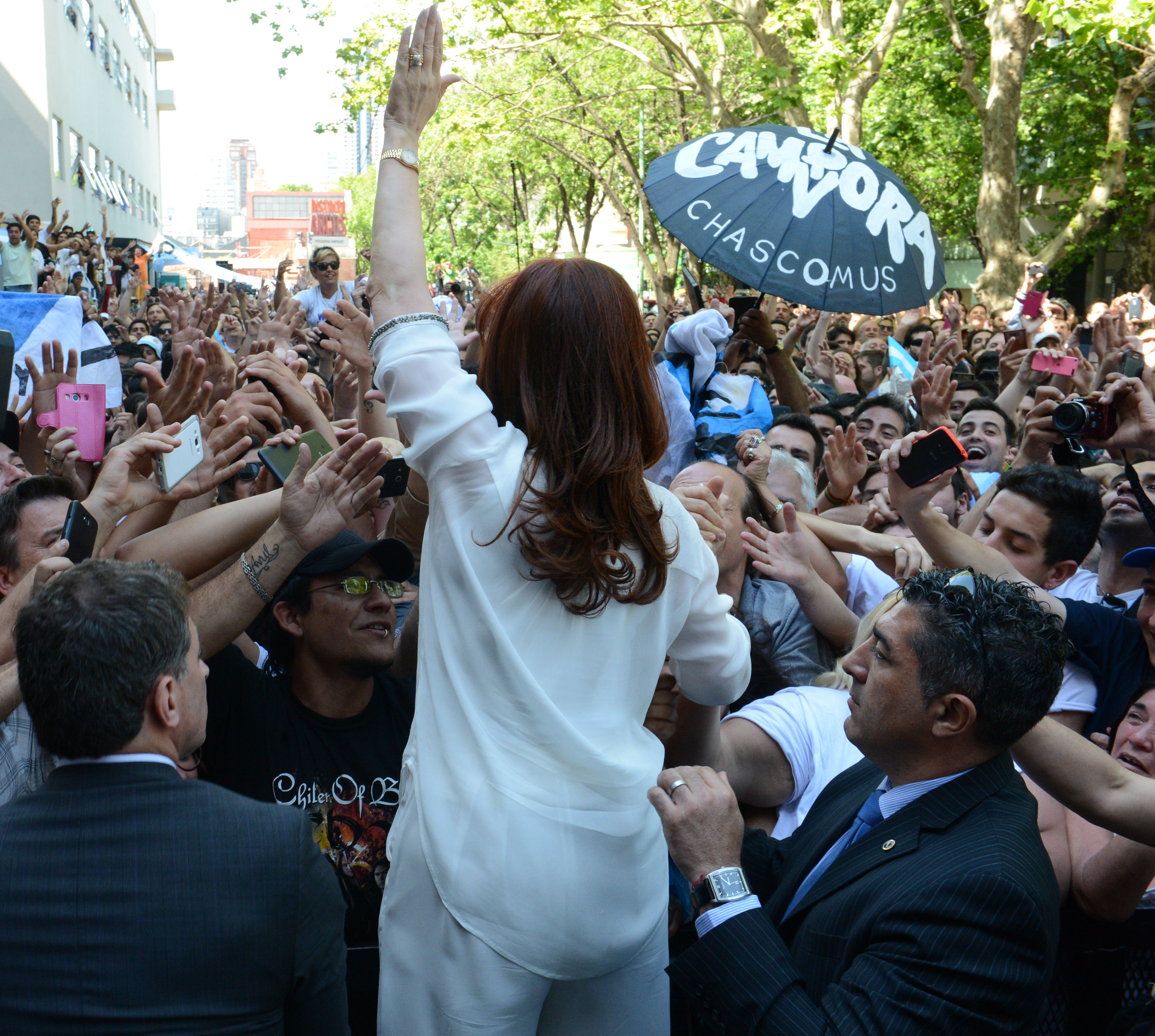 La presidenta Cristina Fernández de Kirchner saludó a los militantes, simpatizantes y público que se acercó hasta el acto de inauguración de obras en el Polo Científico.